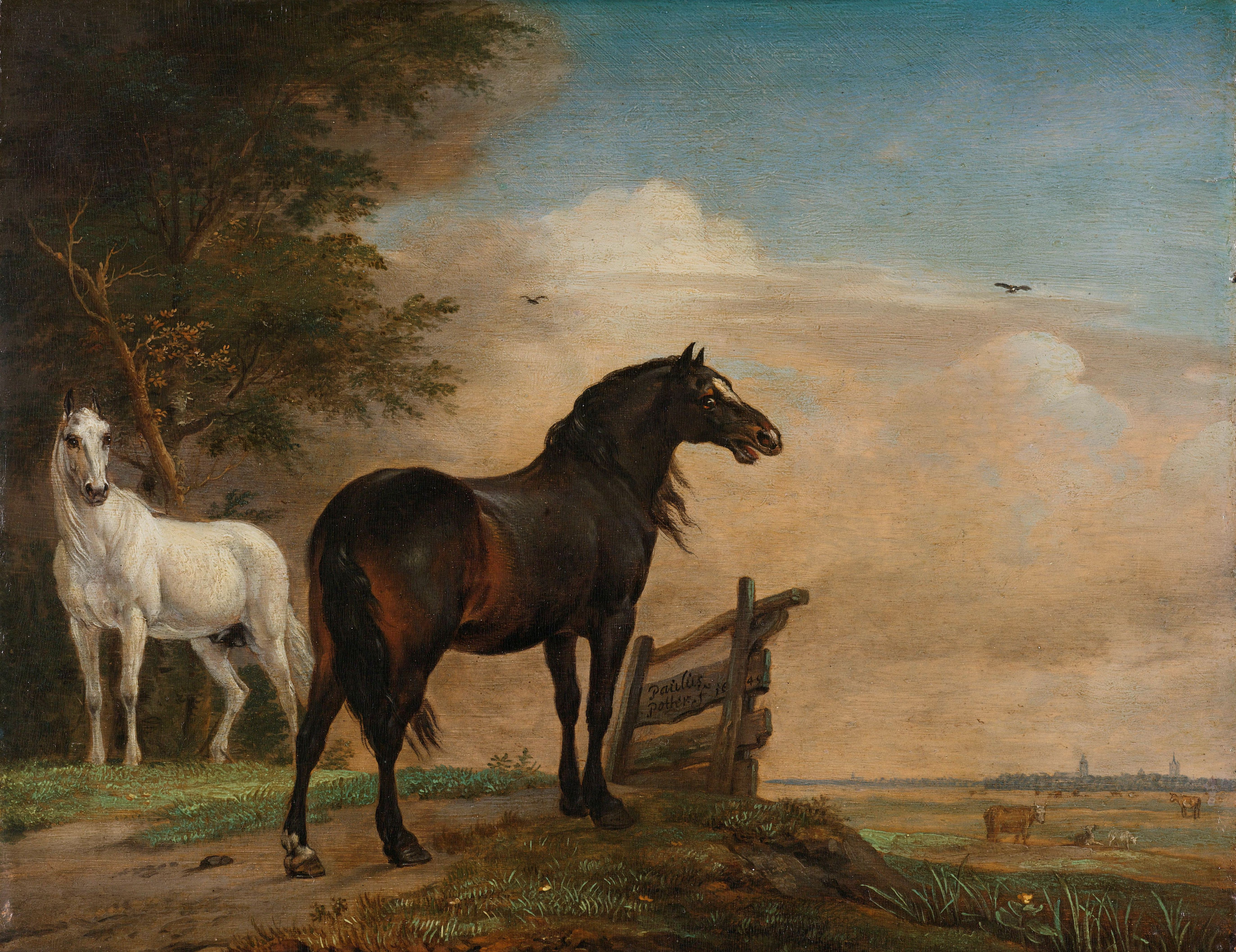 Een donkerbruin en een wit paard staande in de weide bij een hek. Rechts in de verte een weiland met koeien en het profiel van een stad.; Paulus Potter (1625–1654), olieverf op paneel, 1649